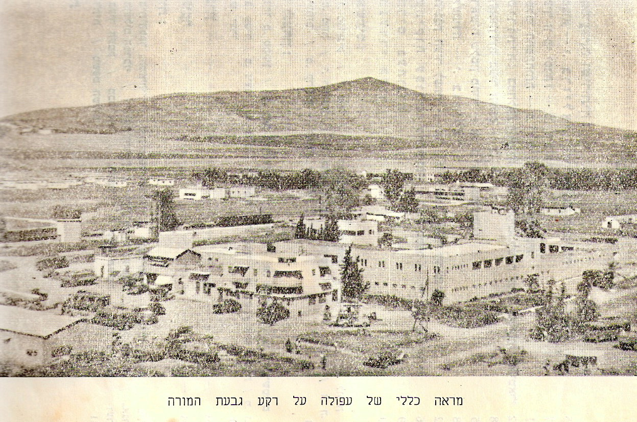 העיר עפולה לפני 1950